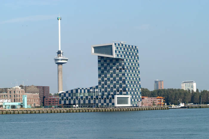 Nieuwbouw STC